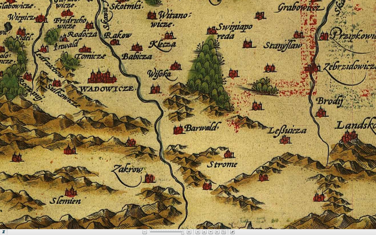 Mapa Księstwa Oświęcimskiego i Zatorskiego (fragment), Antwerpia 1590